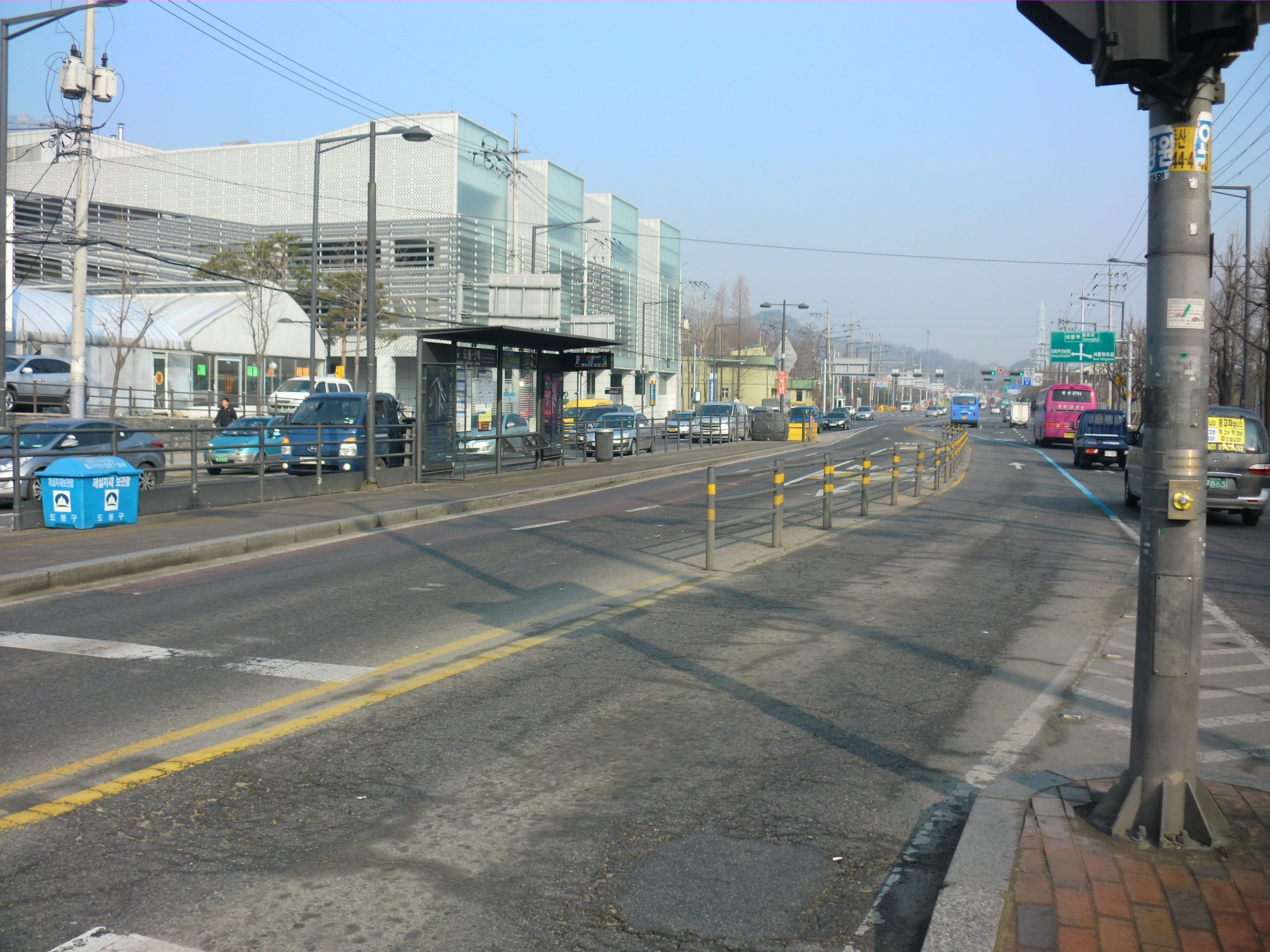 서울특별시 도봉구에 있는 도봉산역 버스정류소